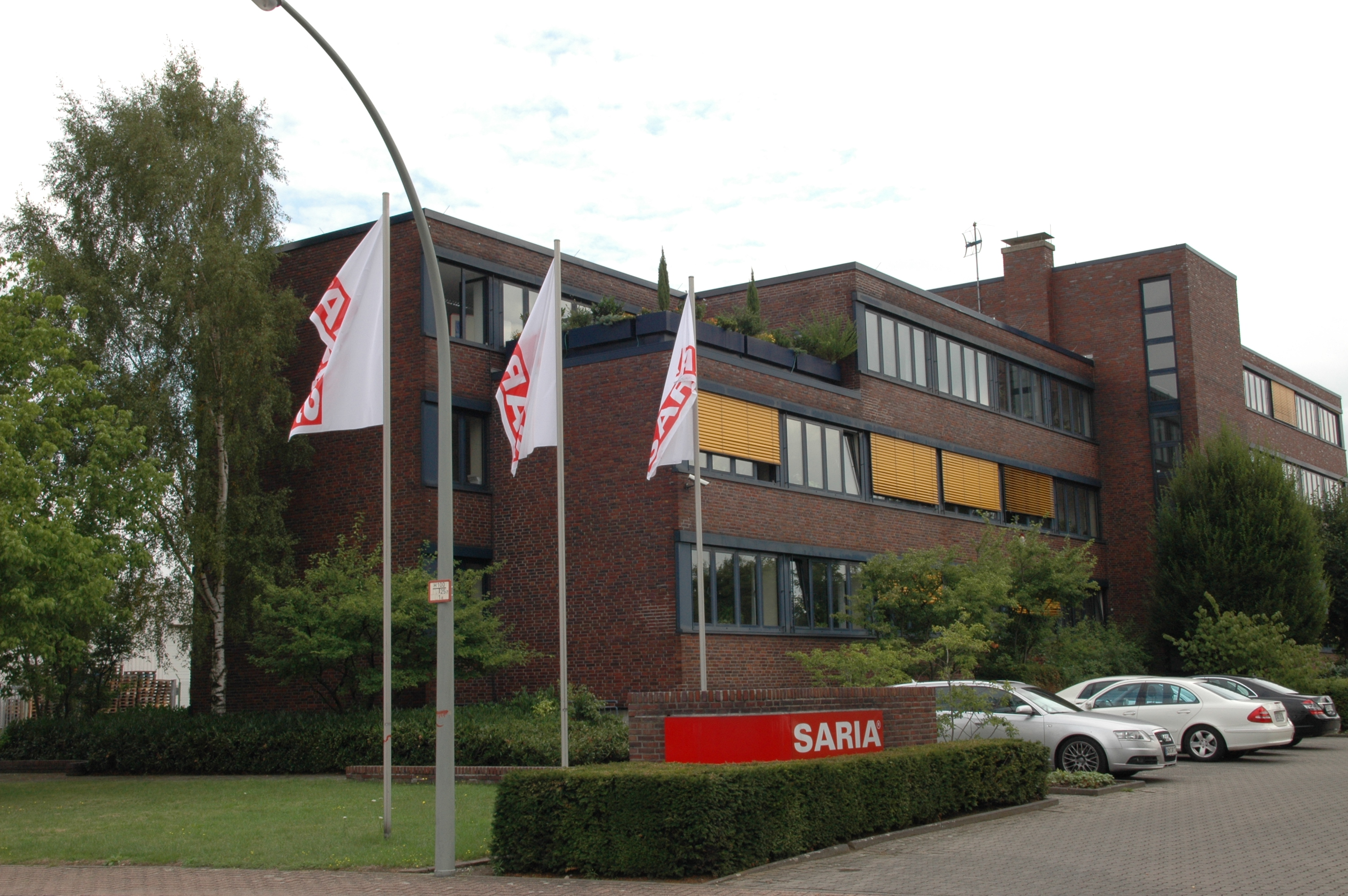 SARIA Hauptverwaltung in Selm